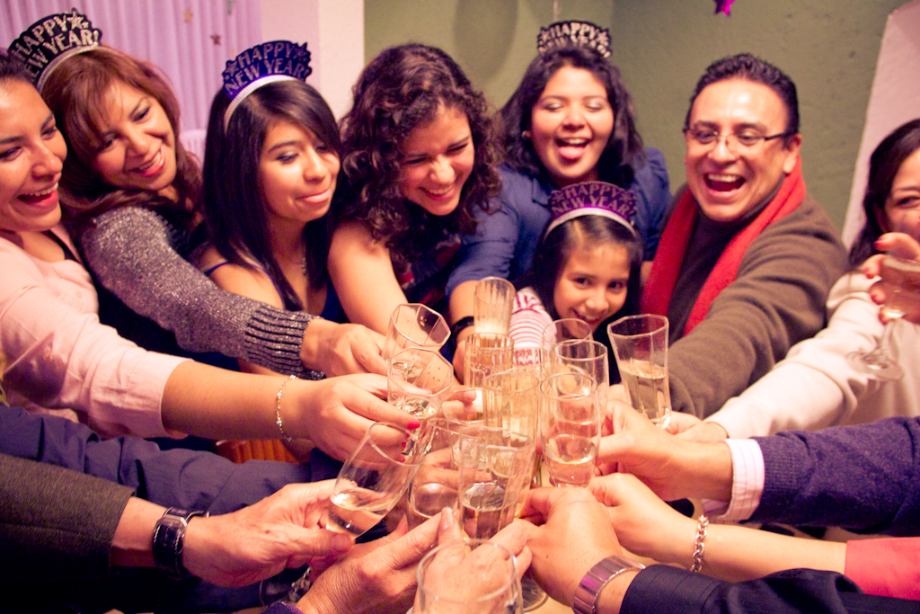 Año nuevo